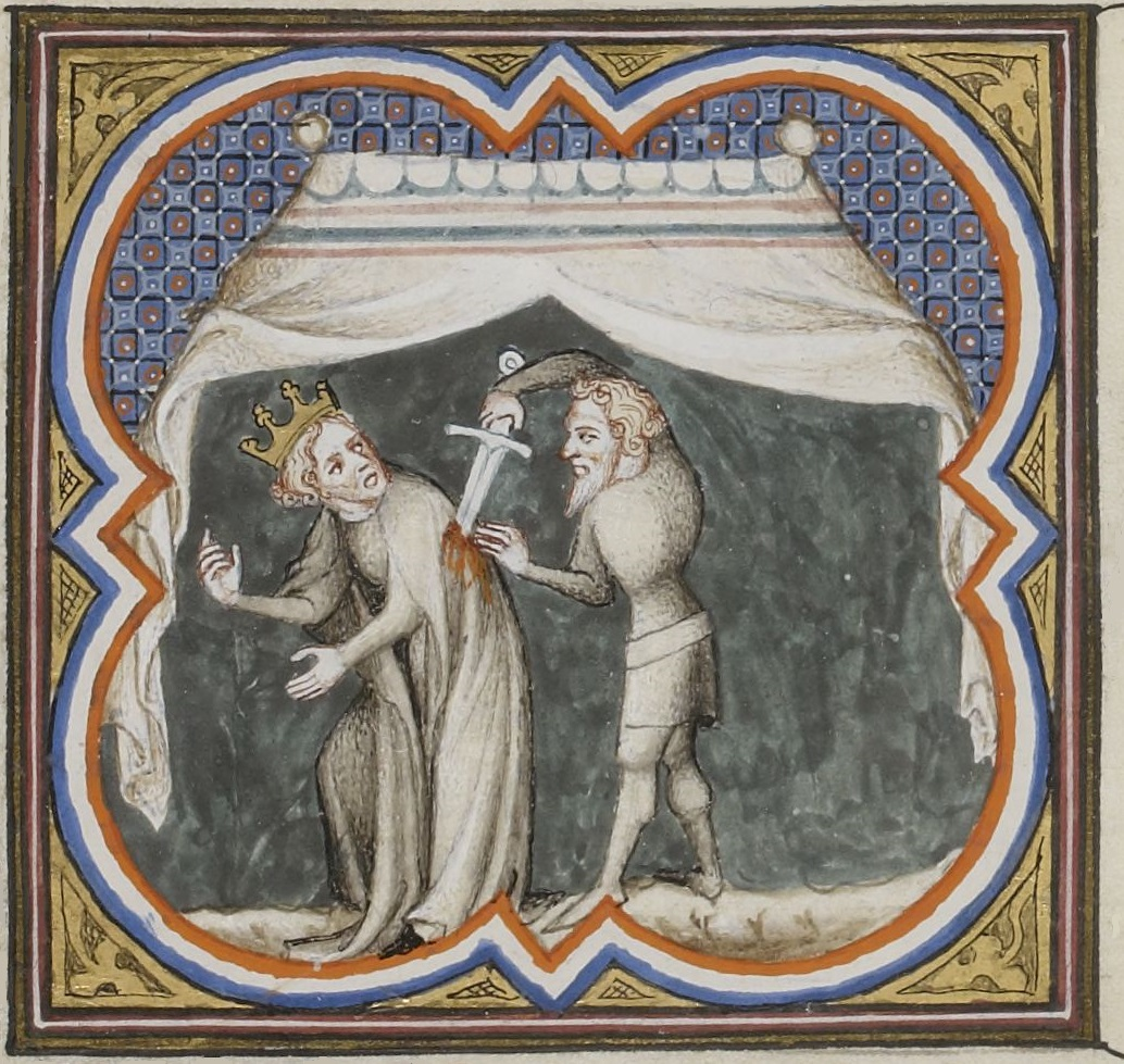 Assassinat de Sigebert Ier. Enluminure des Grandes Chroniques de France, vers 1375-1380. Paris, Bibliothèque Nationale de France, département des Manuscrits, Français 2813, folio 33 verso.